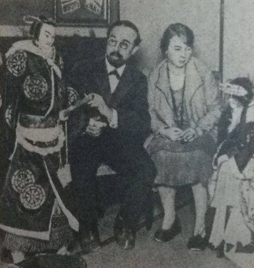 1926年の訪日時のシャルル・ヴィルドラックと妻